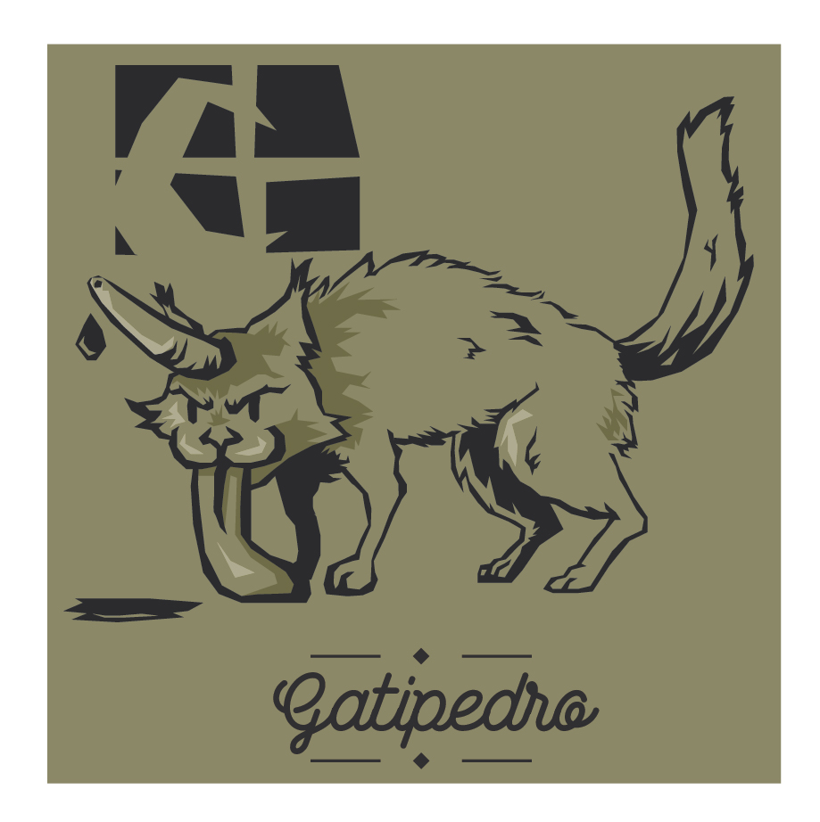 Imaxe do Gatipedro, ser da mitoloxía galega